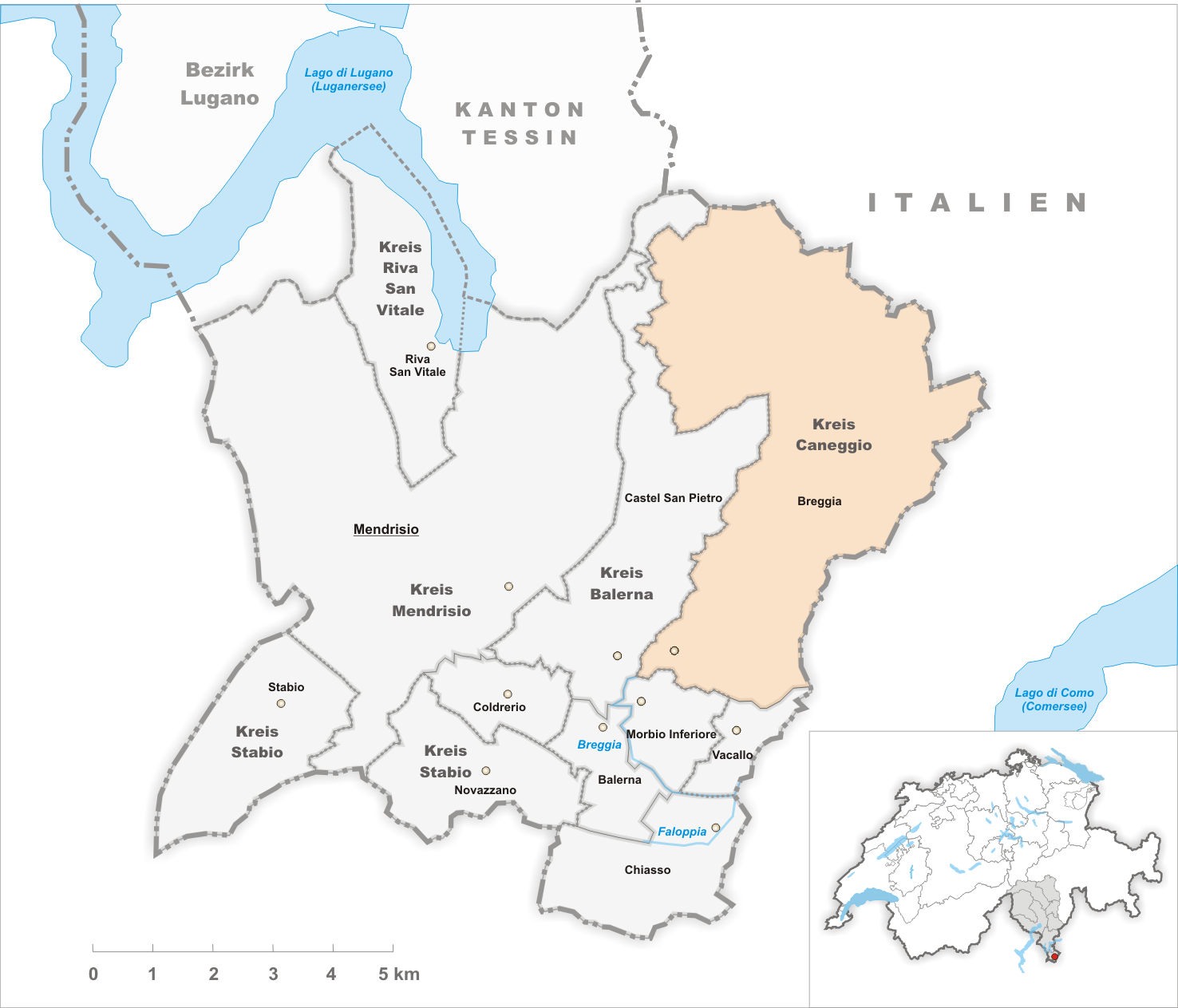 Municipality Breggia